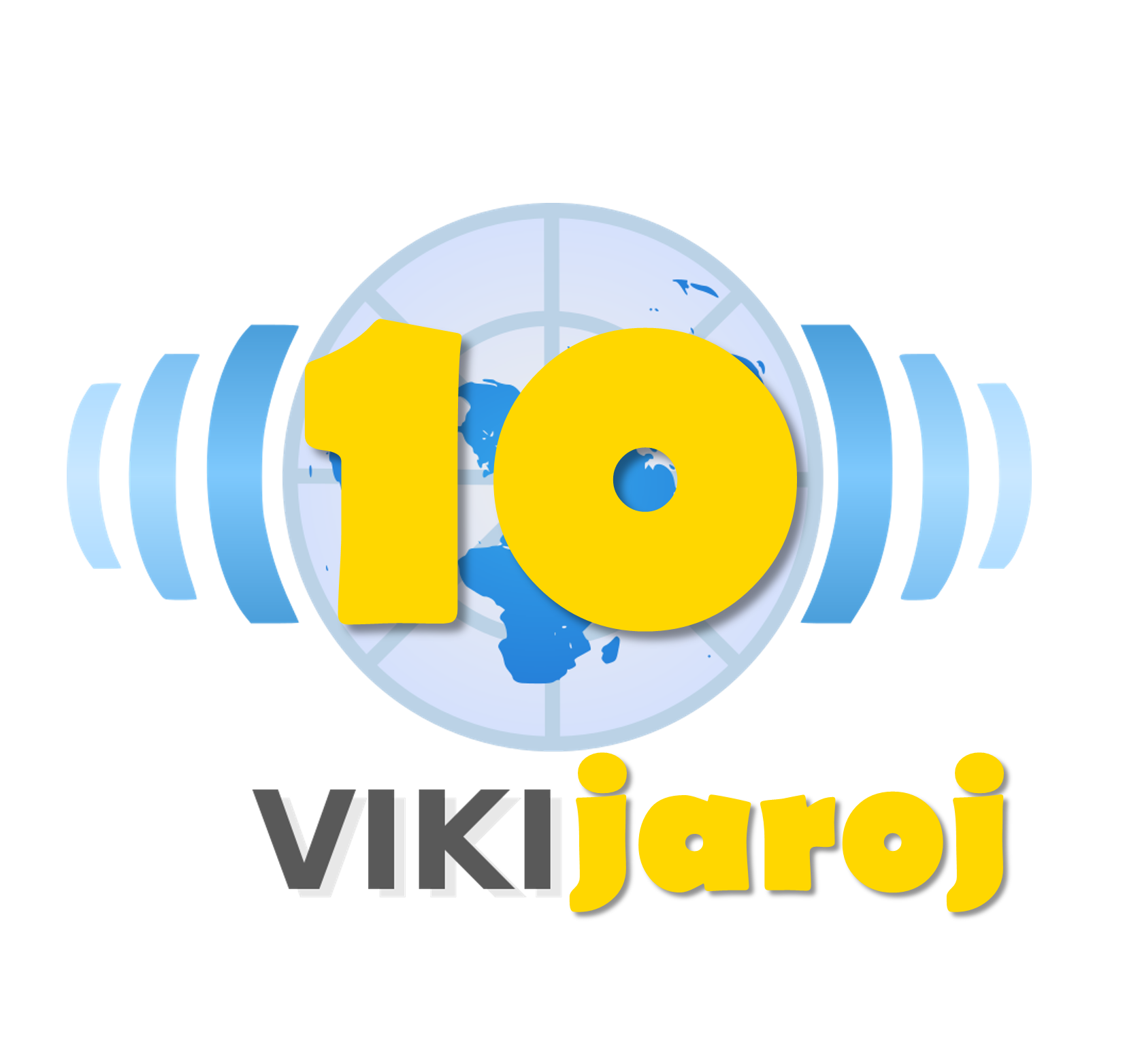 Знак десятилетнего юбилея Викиновостей на эсперанто